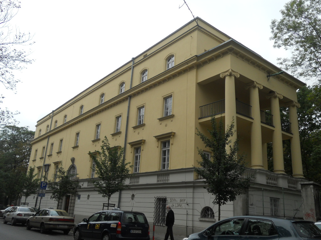 Uniwersytecka szkoła pielęgniarek i higienistek przy ulicy Mikołaja Kopernika 25 w Krakowie.